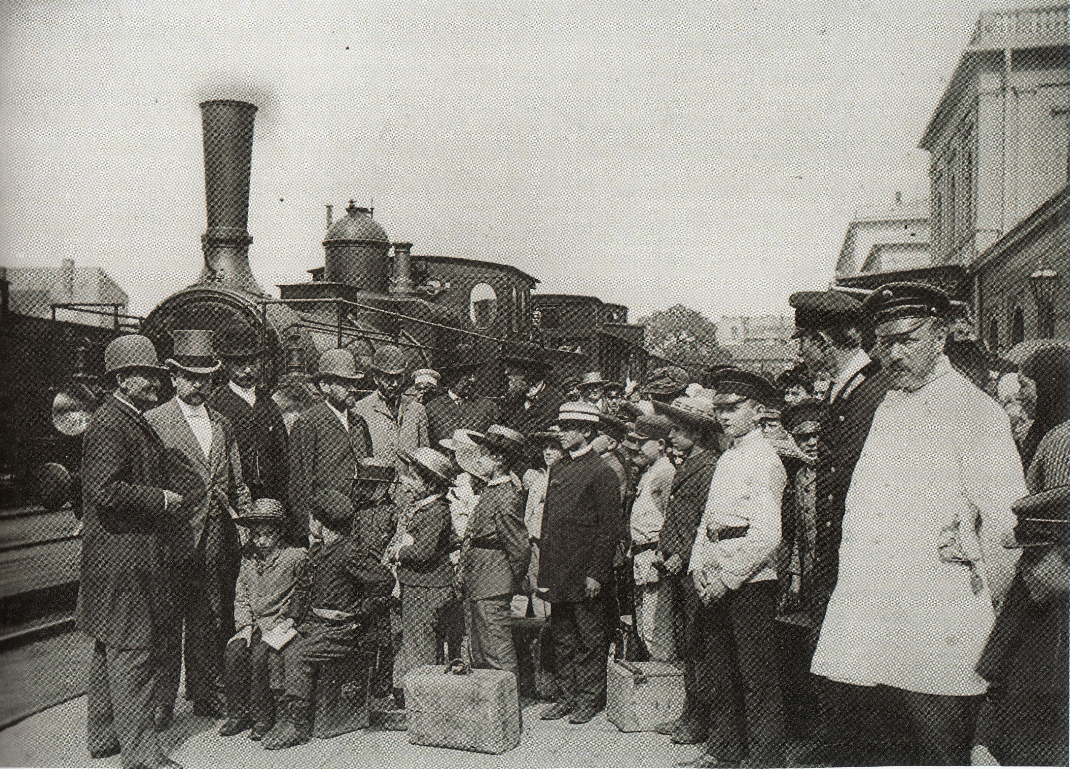 Wyjazd chłopców na kolonie letnie na wieś na Dworcu Wiedeńskim w Warszawie